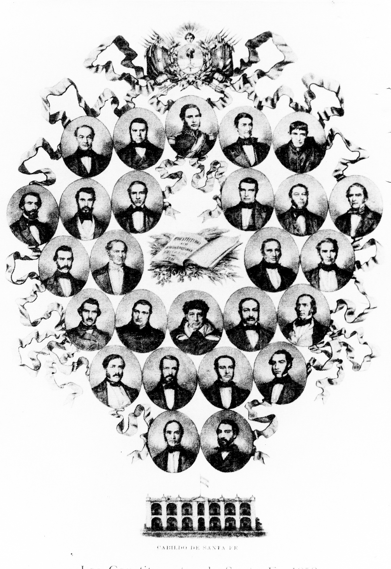 Retratos de los representantes de las Provincias Argentinas en la Asamblea General Constituyente, reunida en Santa Fe para la redacción y promulgación de la Constitución Nacional.